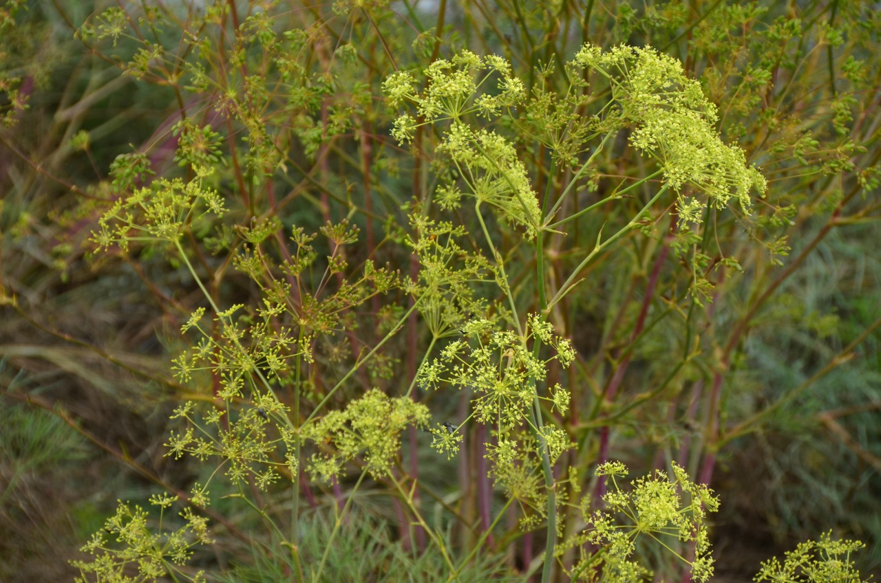 NSG Salzsteppe bei Baumgarten an der March